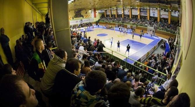 Hala sportowa MOSiR w Radomiu. 2012